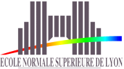 Logo der Ecole normale supérieure de Lyon